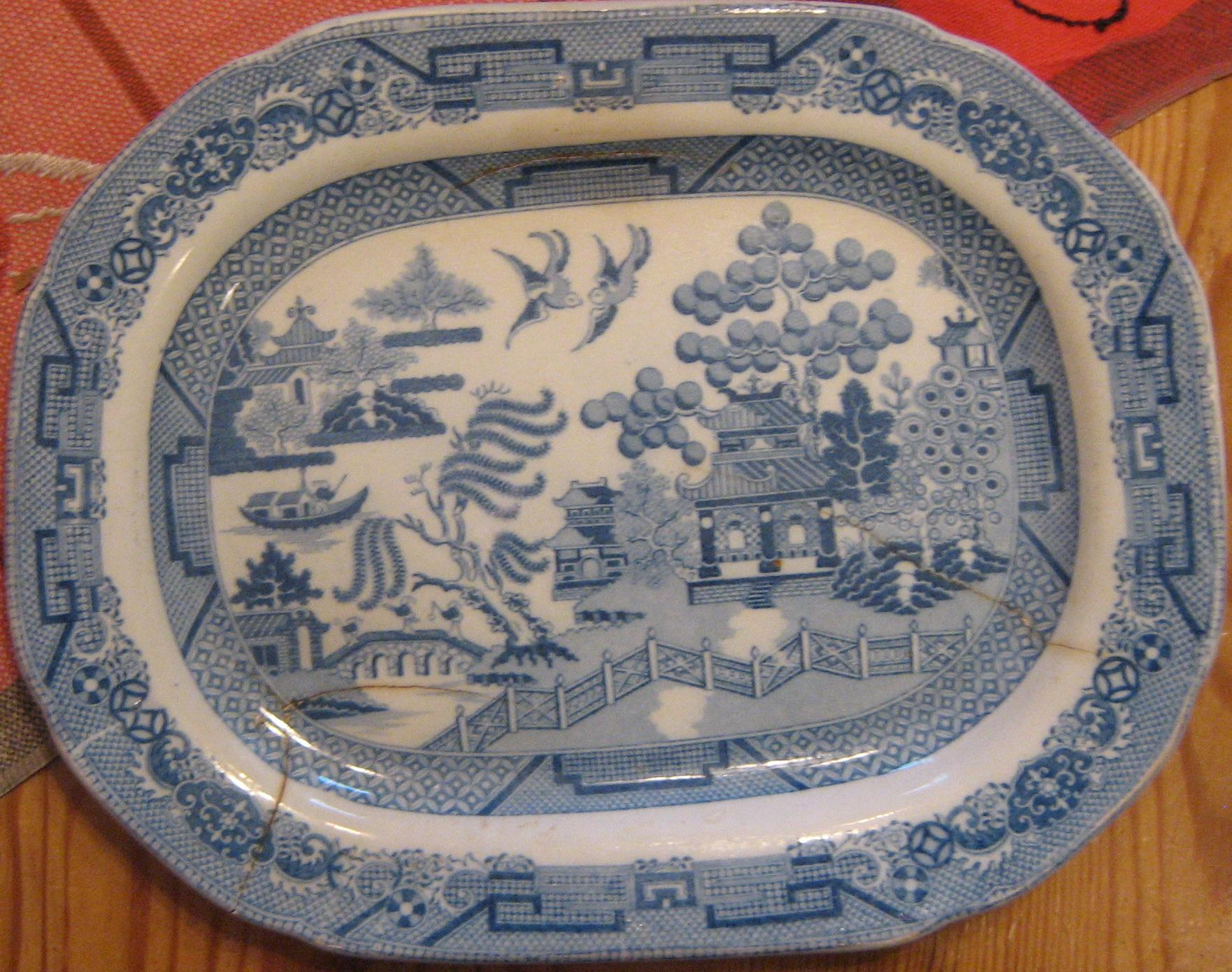 Tallrik med Willow-dekor. Flintgods, engelsk tidigt 1800-tal.